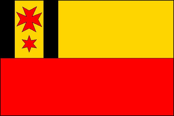 Vlajka obce Plchov